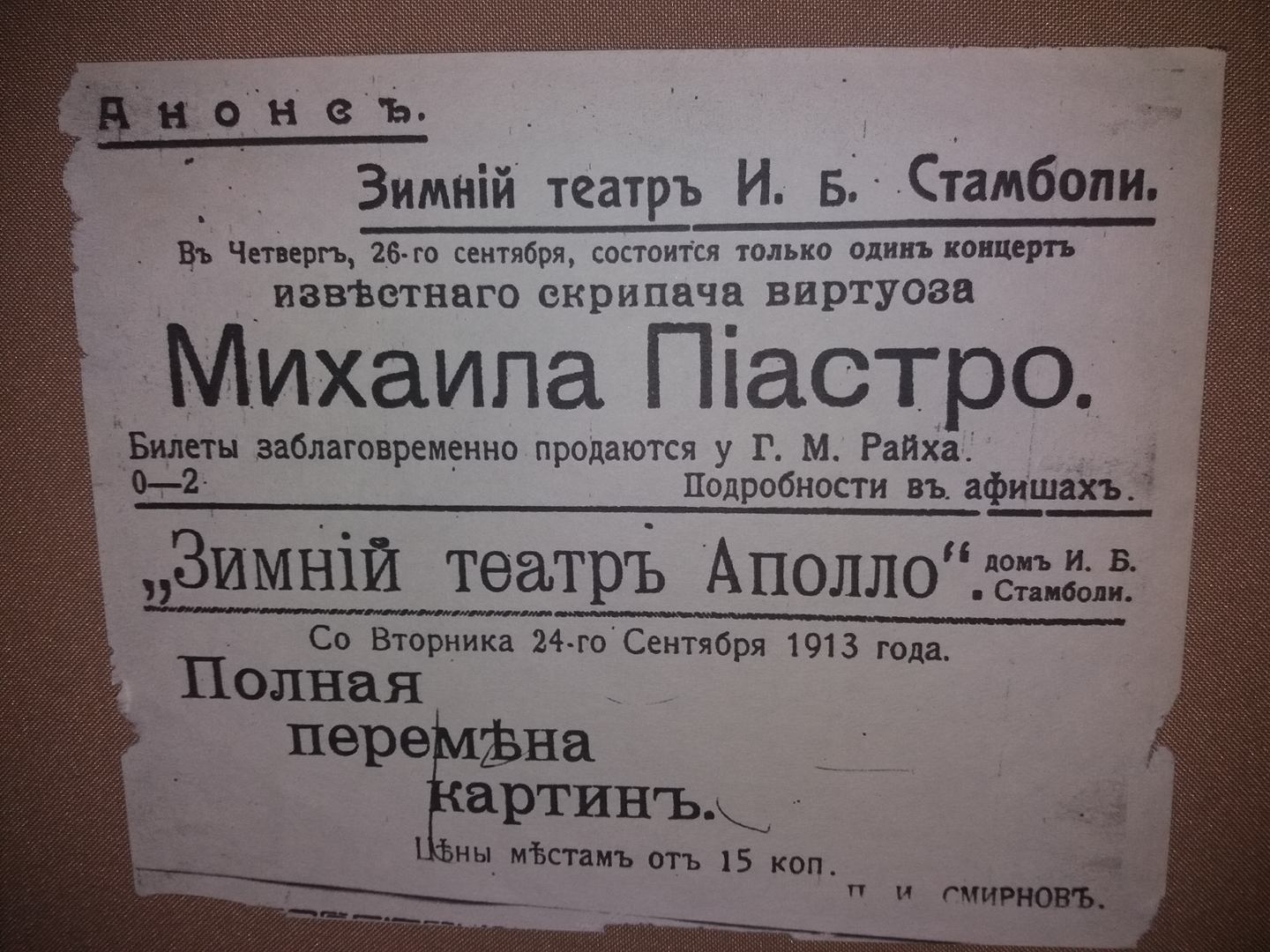 В 1913 году